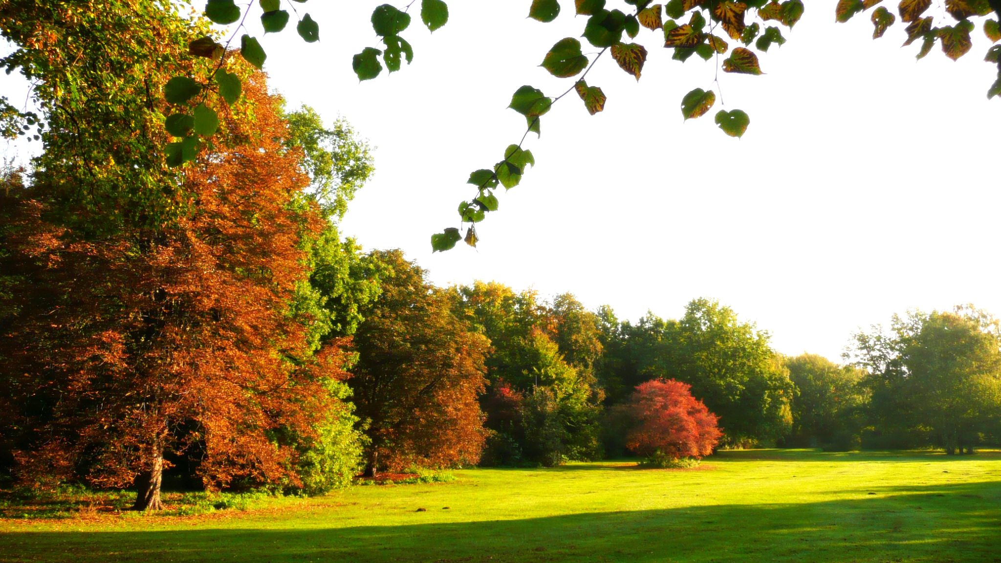 Tiergarten im Oktober